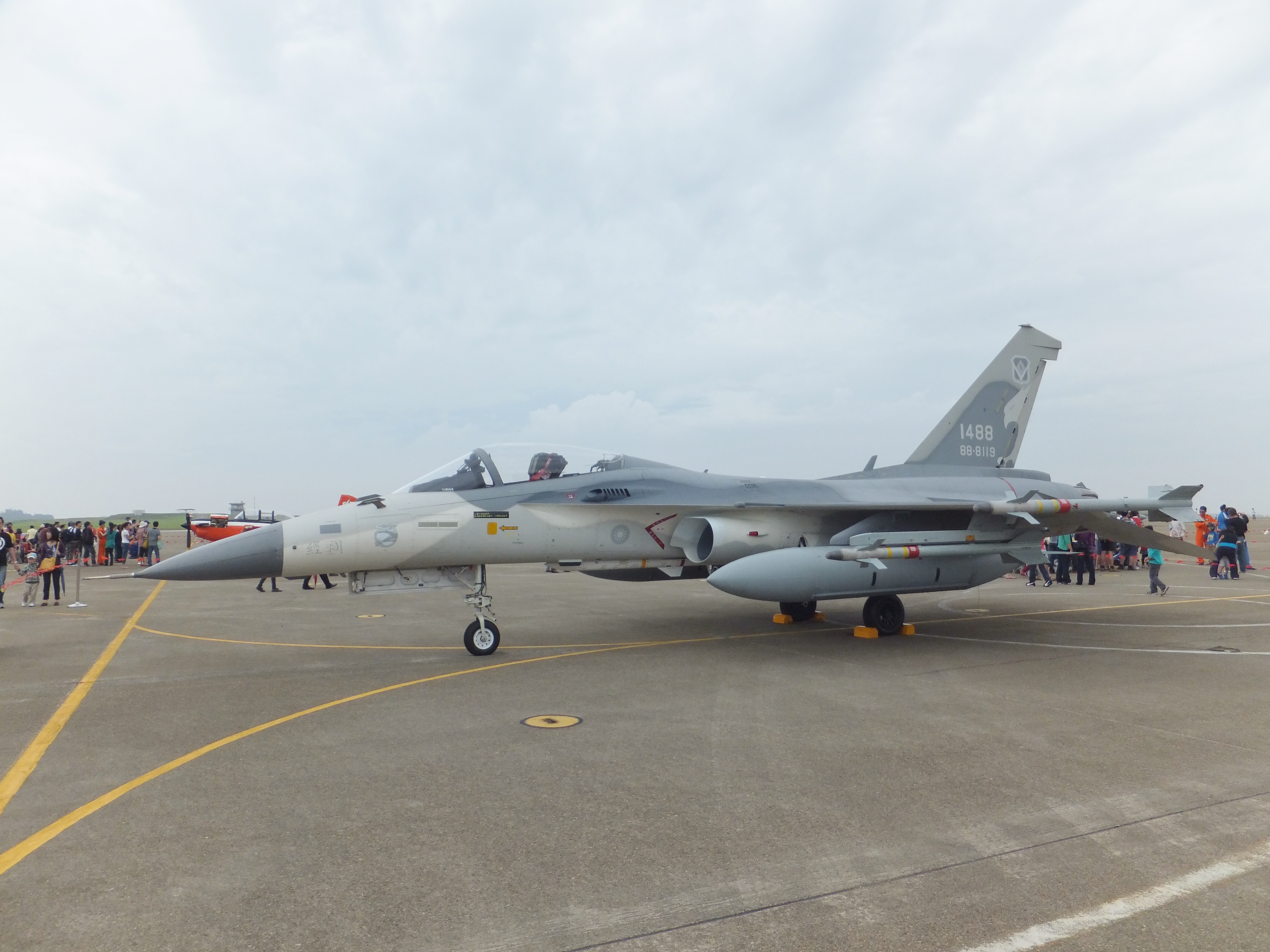 2011年空軍清泉崗基地營區開放活動，會場展示之經國號戰鬥機F-CK-1A 1488。